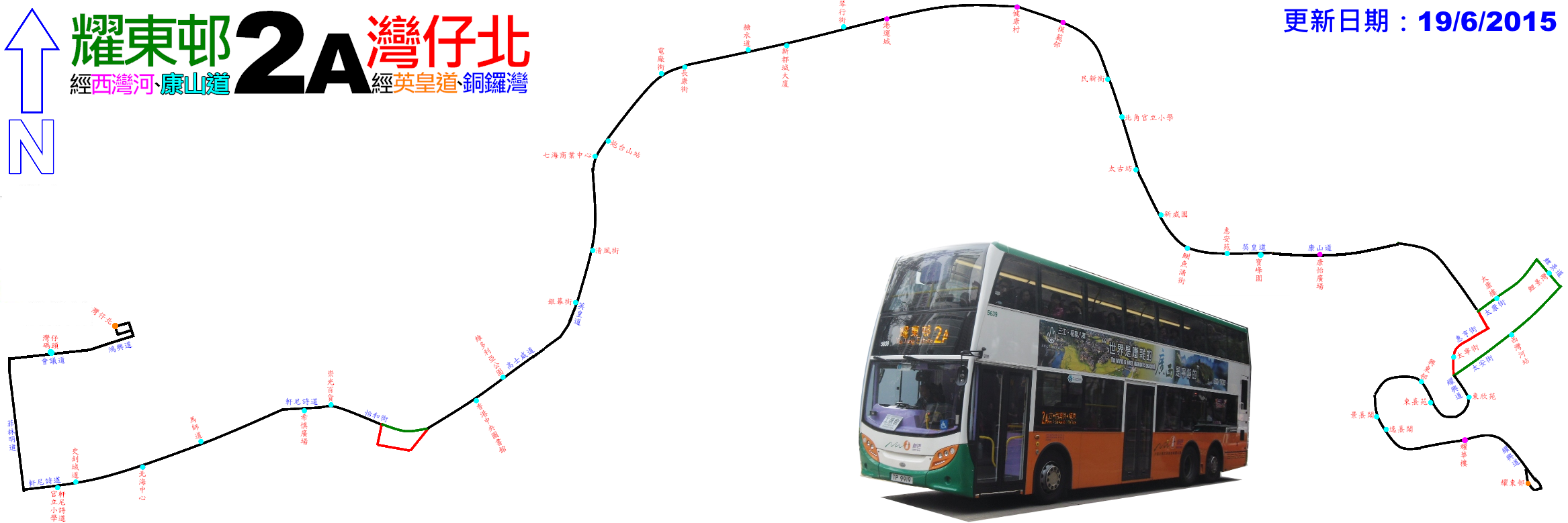 中文（香港）: 新巴2A線的走線圖